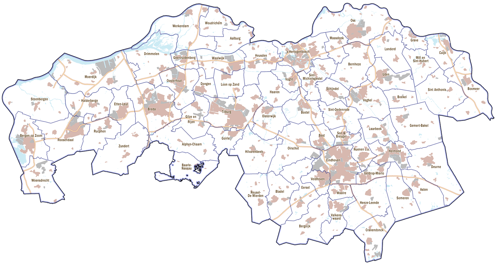 Indeling van gemeenten van de Nederlandse provincie Noord-Brabant, op basis van publiekelijk beschikbare gemeentegrenzen van CBS.